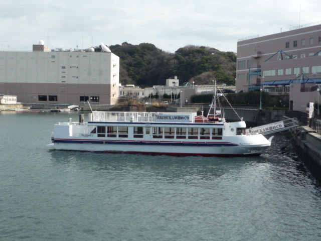 軍港巡りの舟の写真。臨海公園で撮影。